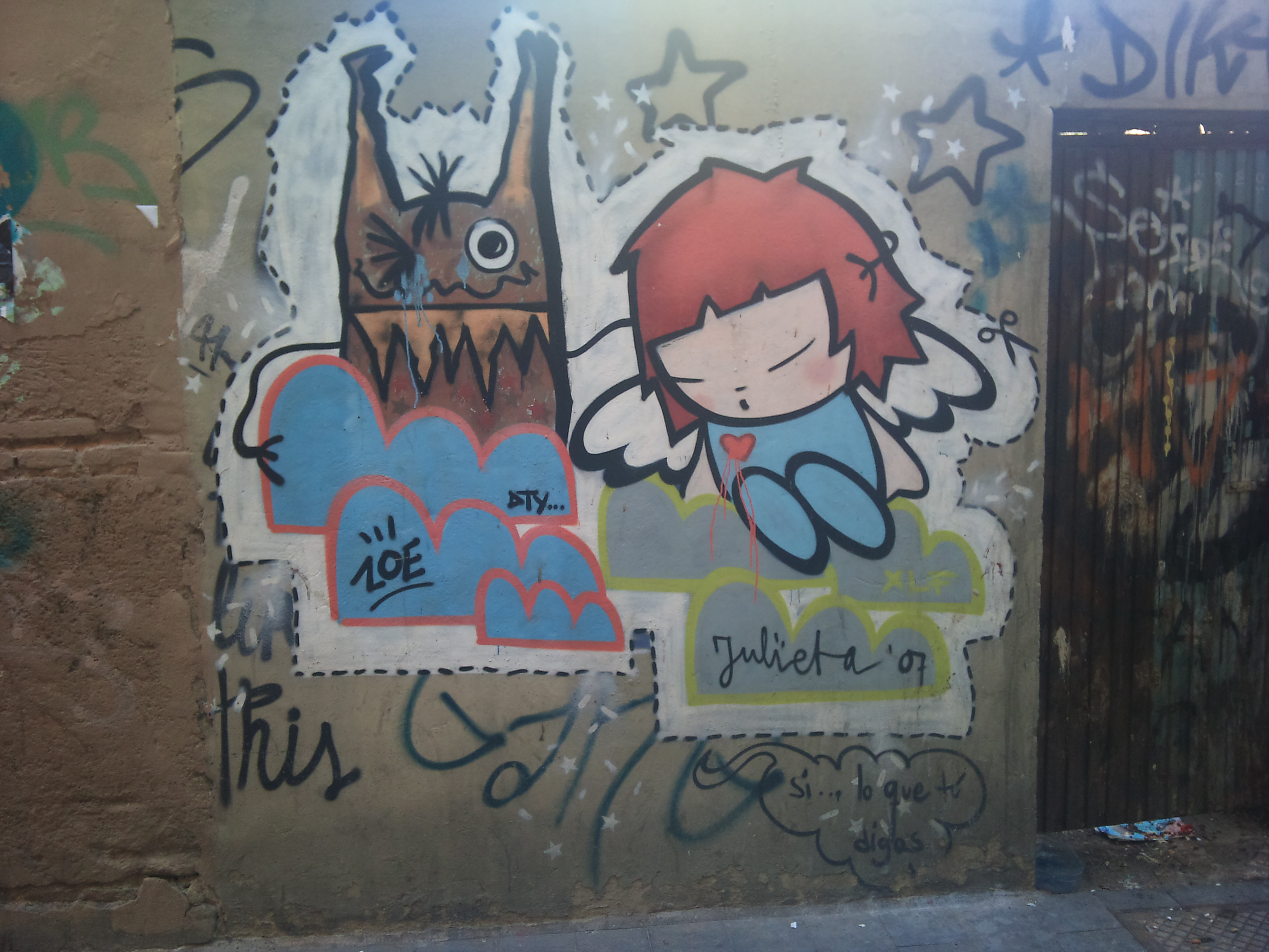 A València, dibuix original de 2007.